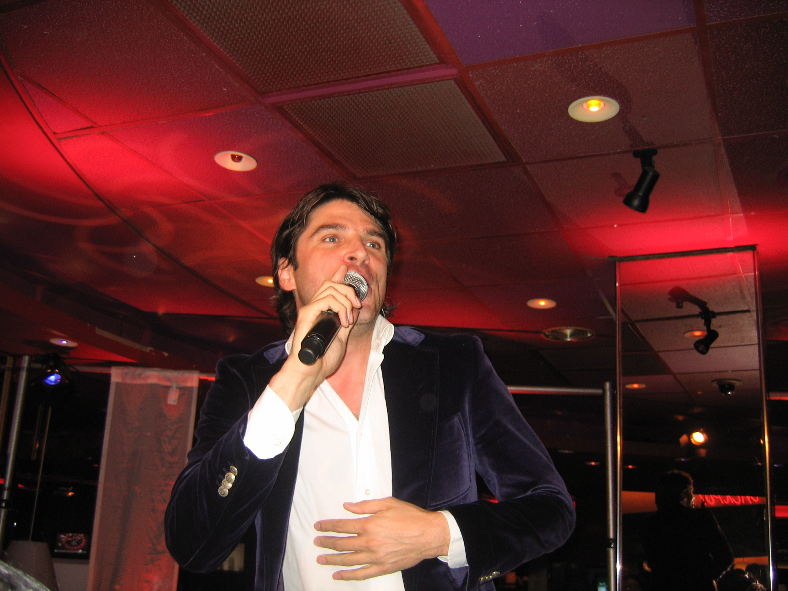 Xander de Buisonje tijdens een optreden in het Holland Casino van Eindhoven -- Alexander Serge (Xander) de Buisonjé (Voorburg, 19 juli 1973) is een Nederlandse zanger, die zowel Nederlands- als Engelstalig zingt. De Buisonjé rondde de havo af aan het Lorentz Casimir Lyceum in Eindhoven. In die tijd woonde hij bij zijn ouders in de Sonse wijk De Gentiaan. De Buisonjé kreeg bekendheid met de Maastrichtse band Volumia!, die op 18 april 2002 zijn laatste optreden gaf.